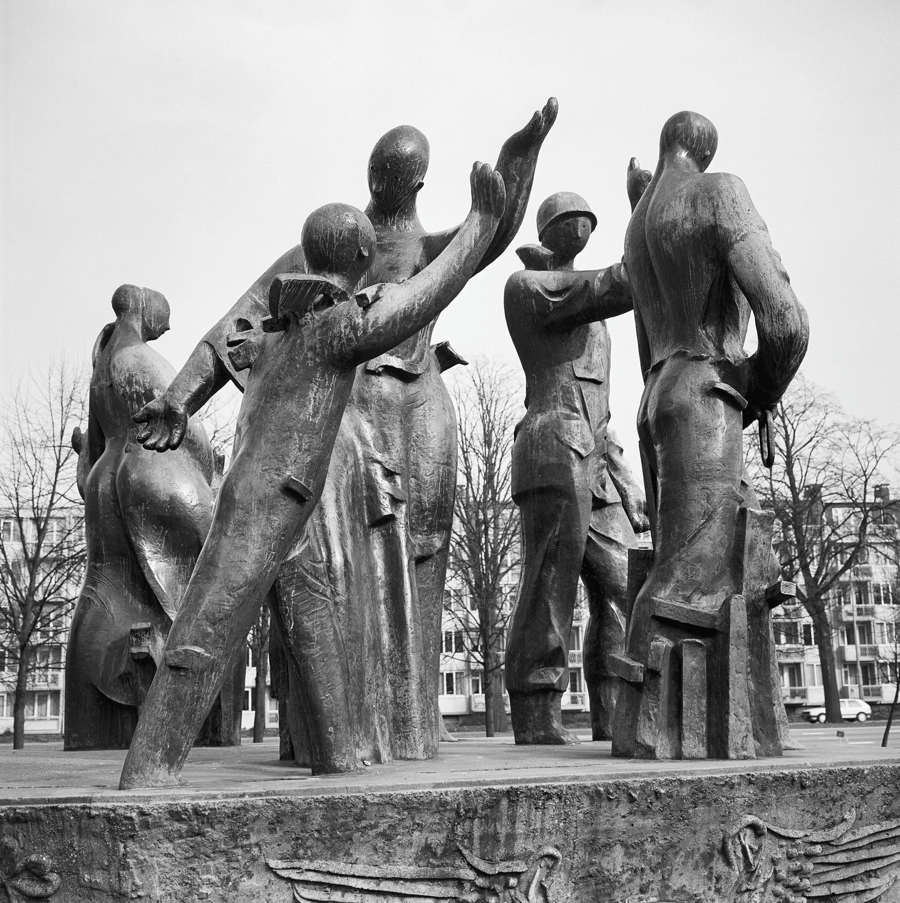 Monument 1940-1945: Overzicht beeldengroep